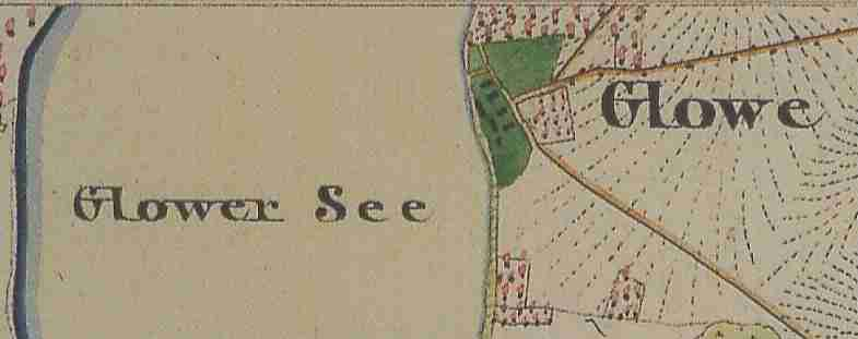 Glowe, Wohnplatz im Ortsteil Leißnitz, Stadt Friedland, Landkreis Oder-Spree, Brandenburg, Deutschland, Ausschnitt aus dem Urmesstischblatt 3951 Trebatsch von 1846